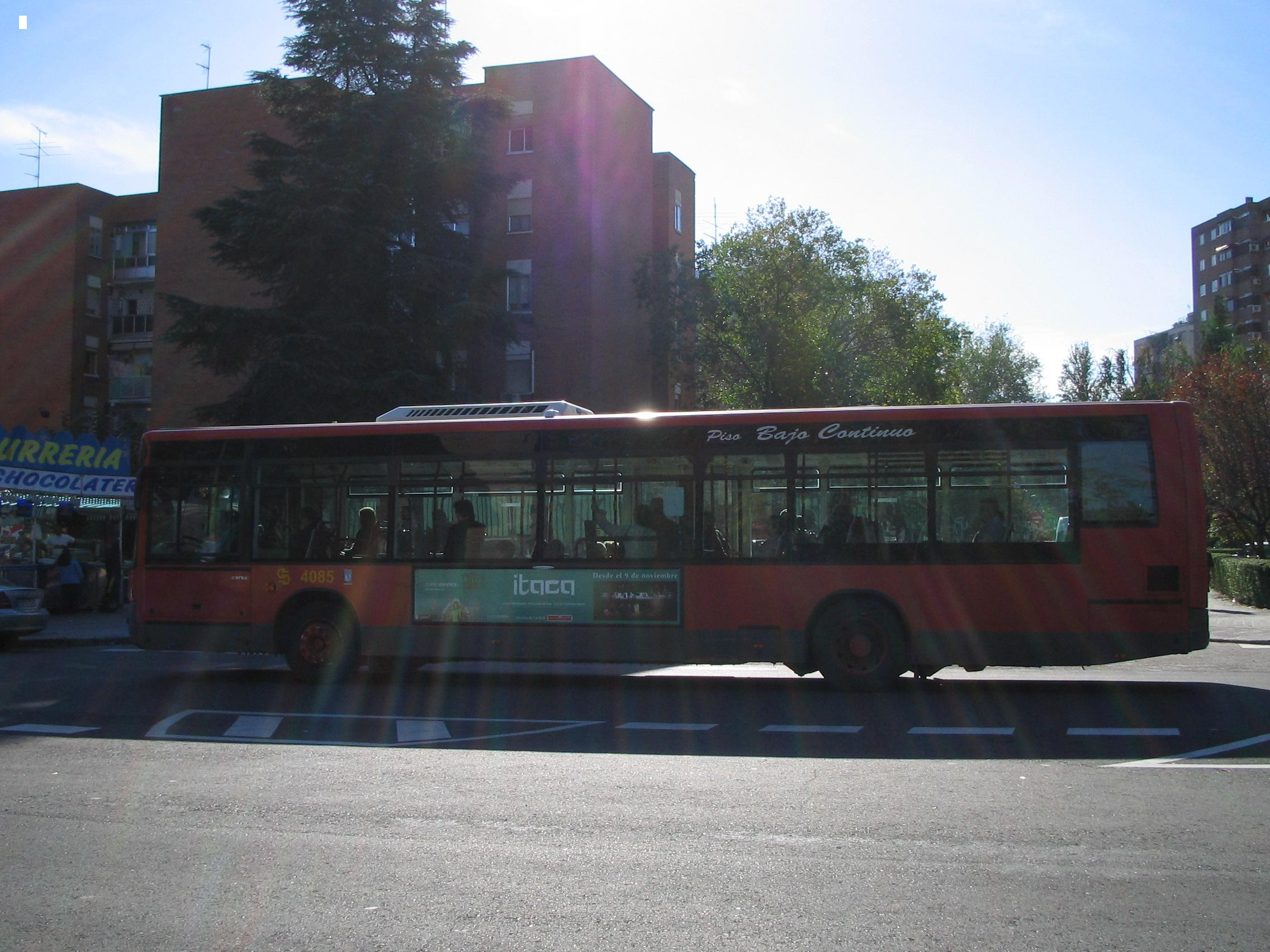 Autobús de la EMT Madrid en la Ciudad de los Ángeles, un barrio de esta ciudad.